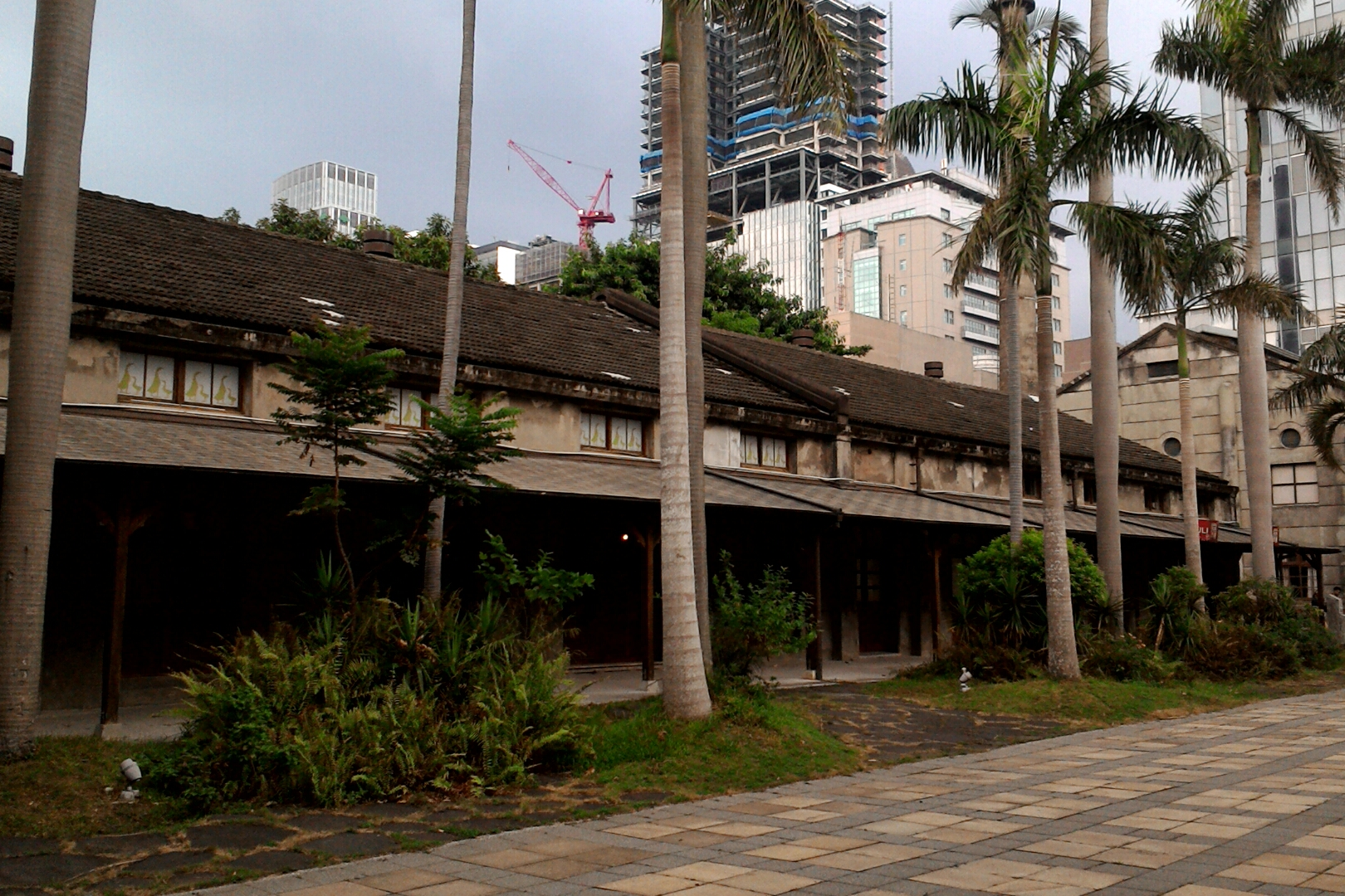 松山菸廠機械修理廠,台北市信義區三張犁次分區新仁里